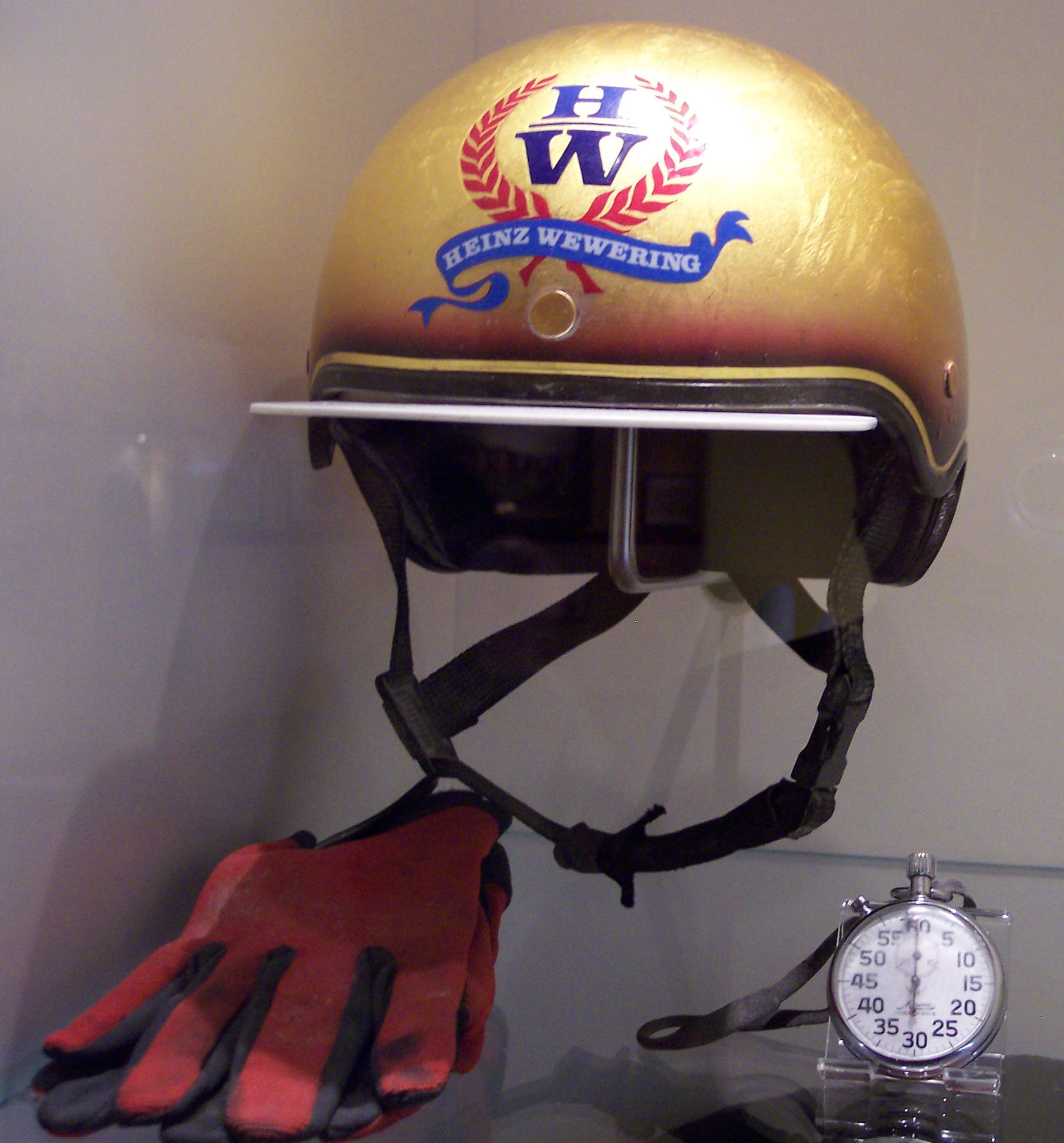 Heinz Wewering Helm Handschuhe Stopuhr